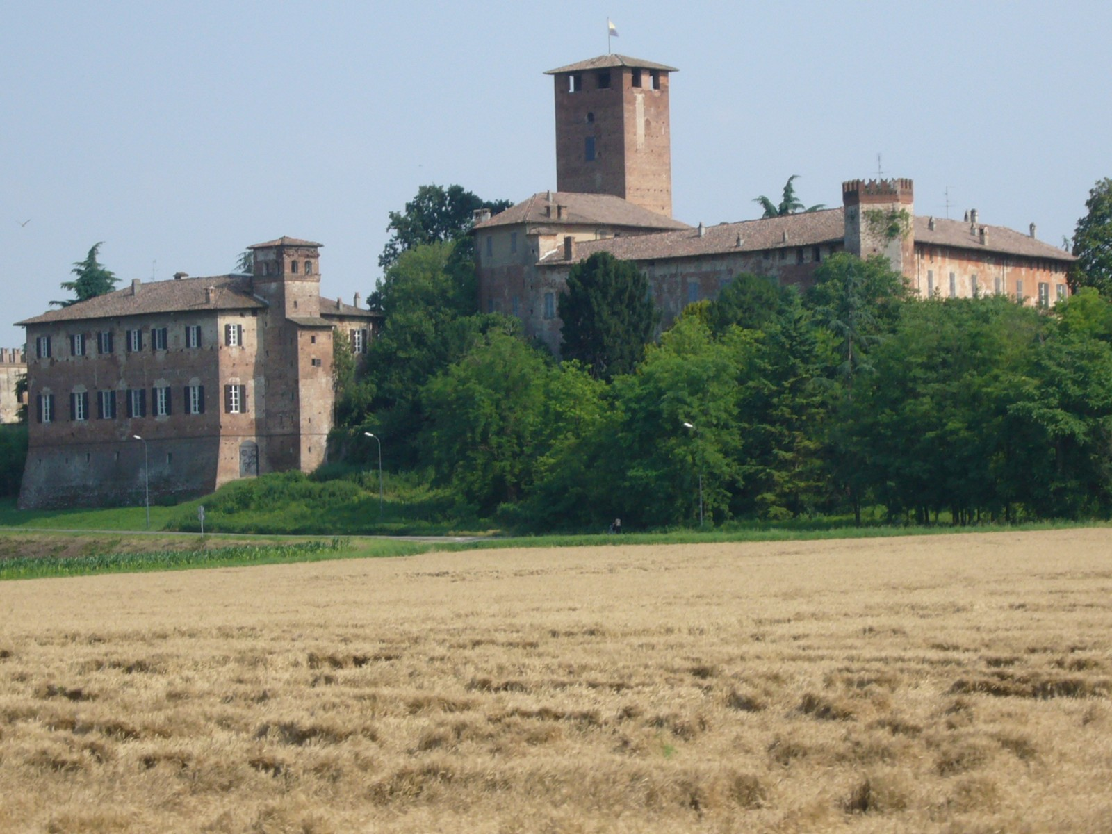 Castello di Sarmato, Piacenza, Italia